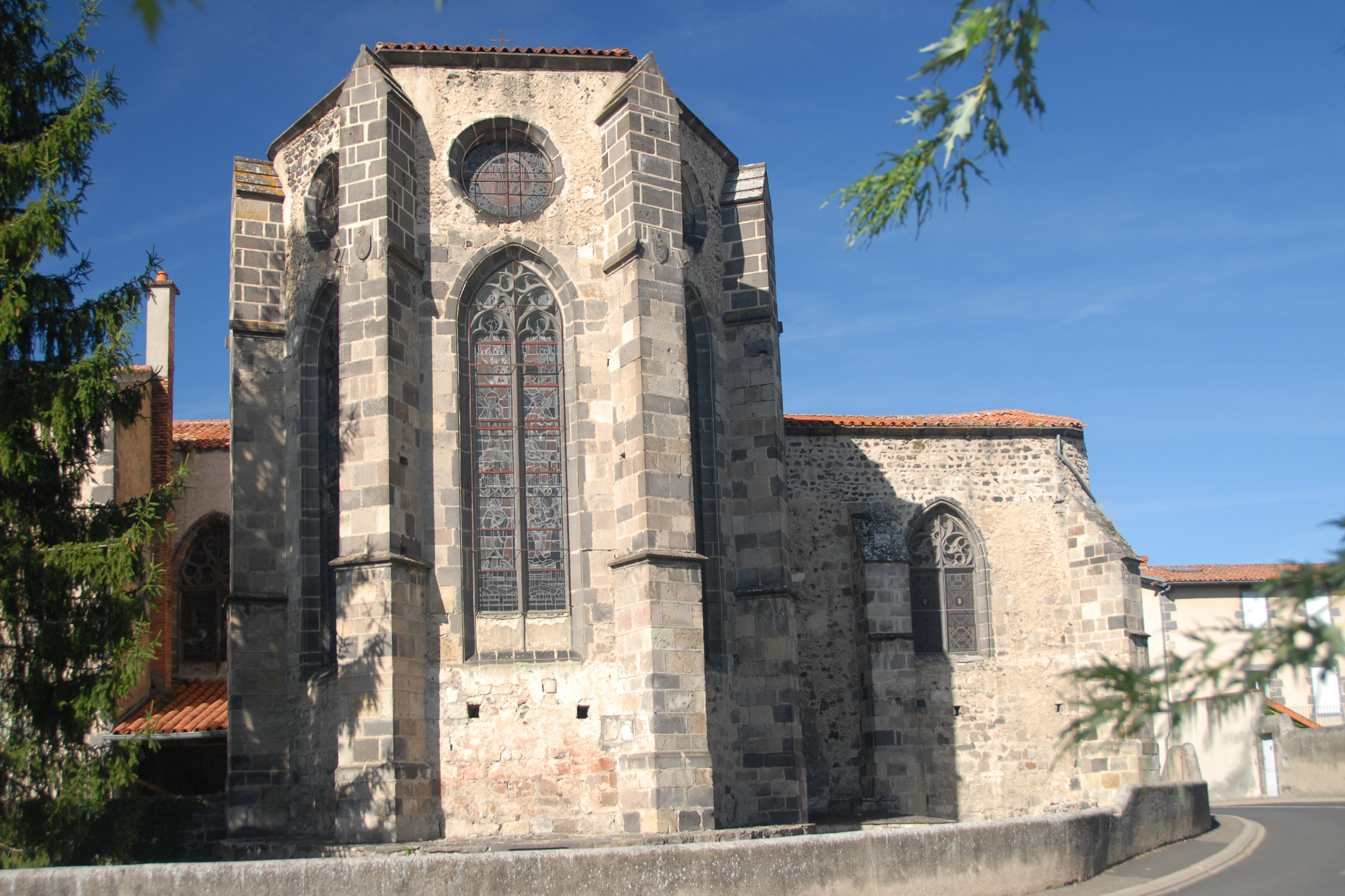 Mozat, goth. Chor